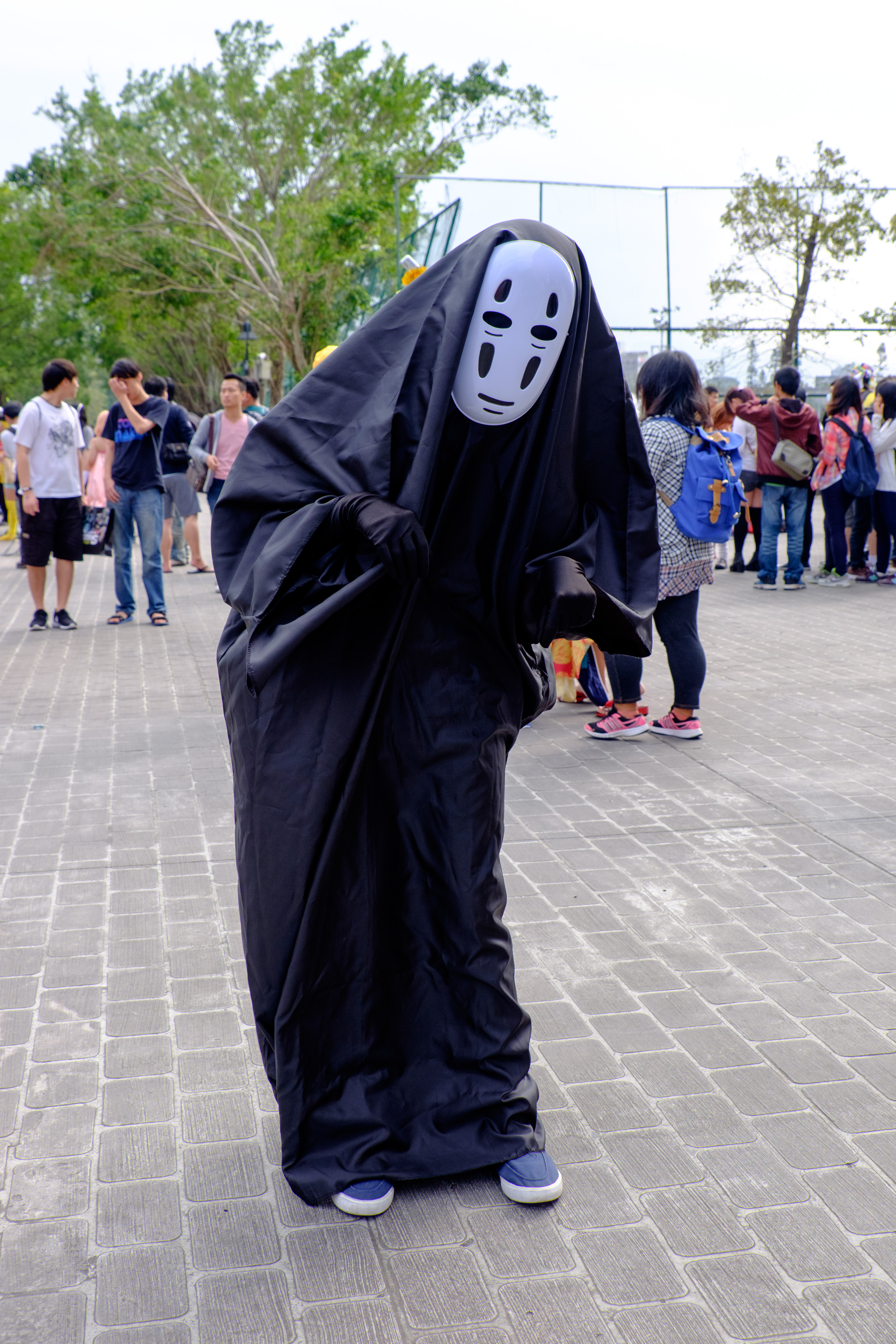 中文（台灣）: PF23第二日下午，＜千と千尋の神隠し＞無臉男cosplayer。